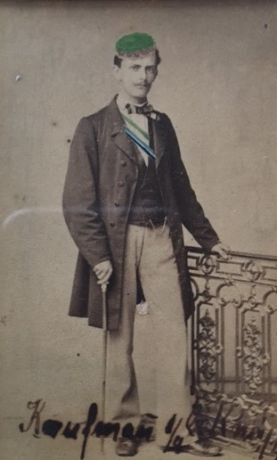 Kolorierte Fotografie von Gustav Kaufmann als Corpsstudent in Tübingen